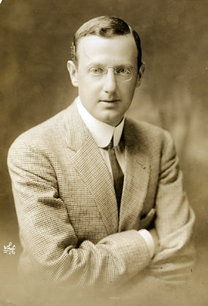 Film producer Jesse L. Lasky.